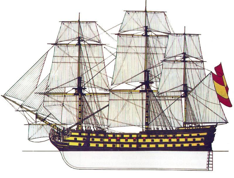 Navío Santa Ana de la Armada Española, realizado por Rafael Berenguer (1822-1890), museo naval de Madrid